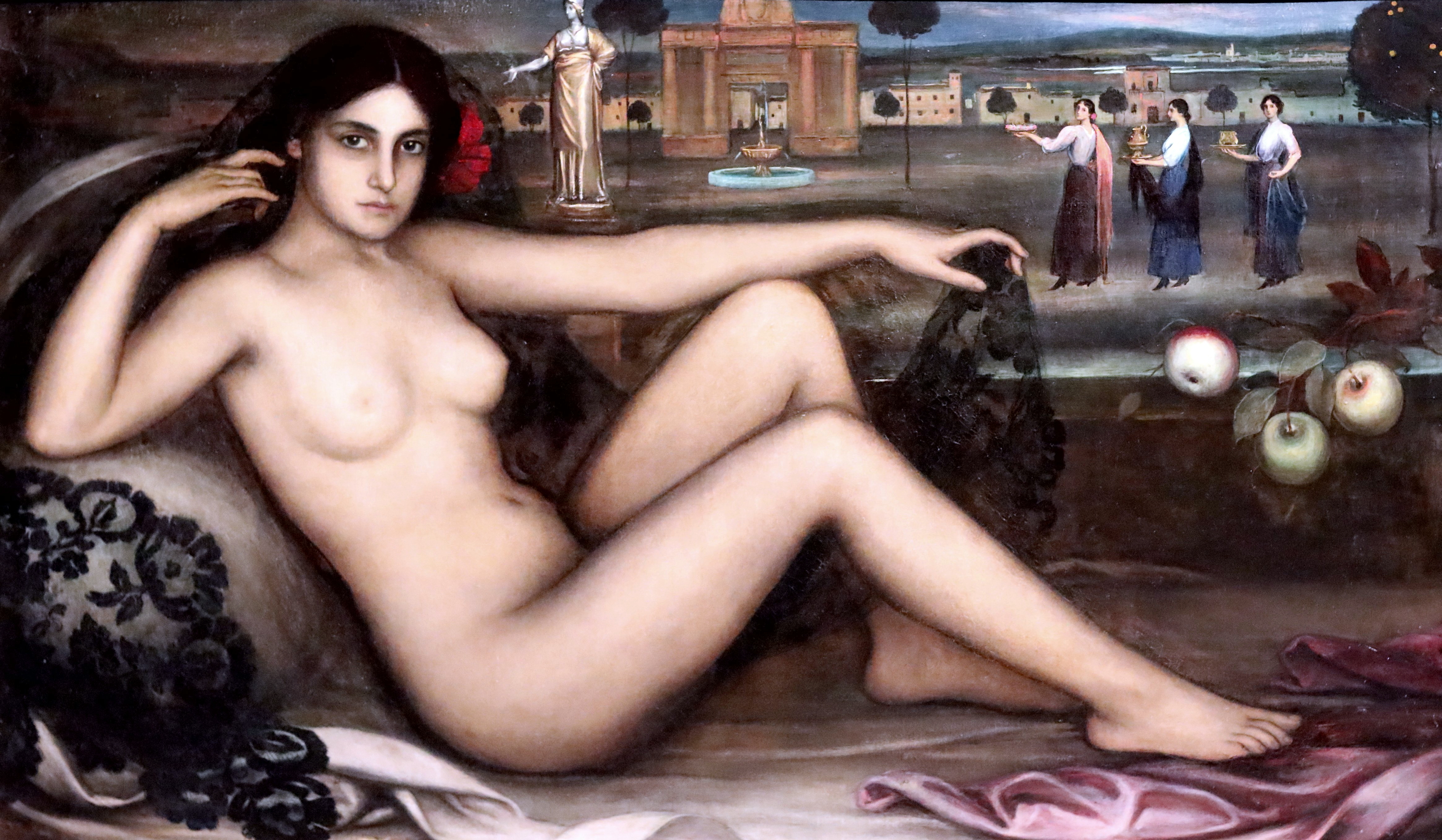 El Retablo del Amor de Julio Romero de Torres.